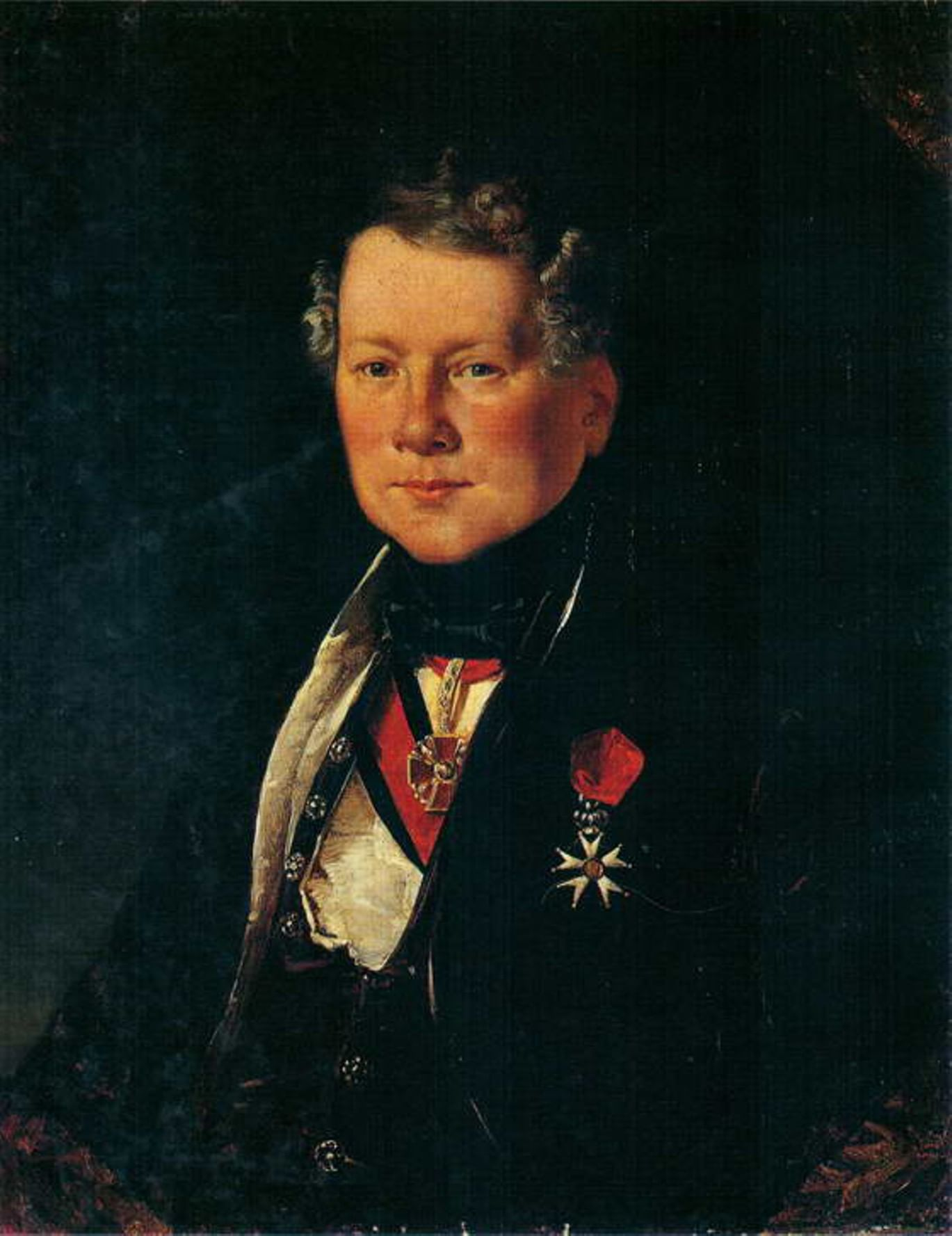 Анри́ Луи́ Огю́ст Рика́р де Монферра́н (фр. Henri Louis Auguste Ricard de Montferrand) (1786-1858).